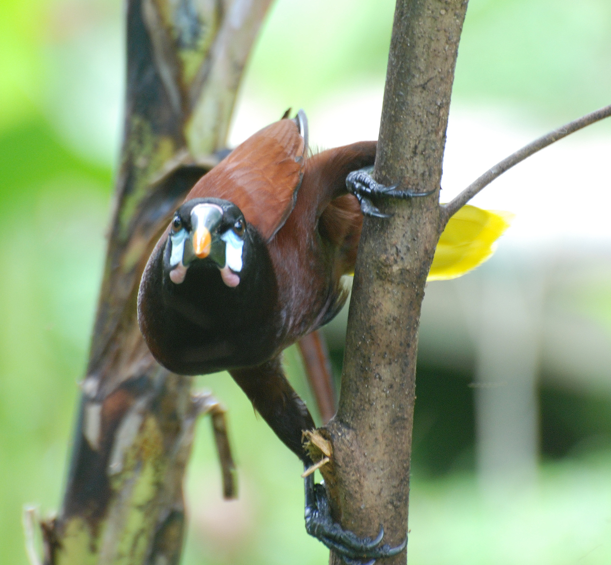 Montezuma Oropendola (Psarocolius montezuma) at Selva Verde Lodge, Costa Rica, 080225.